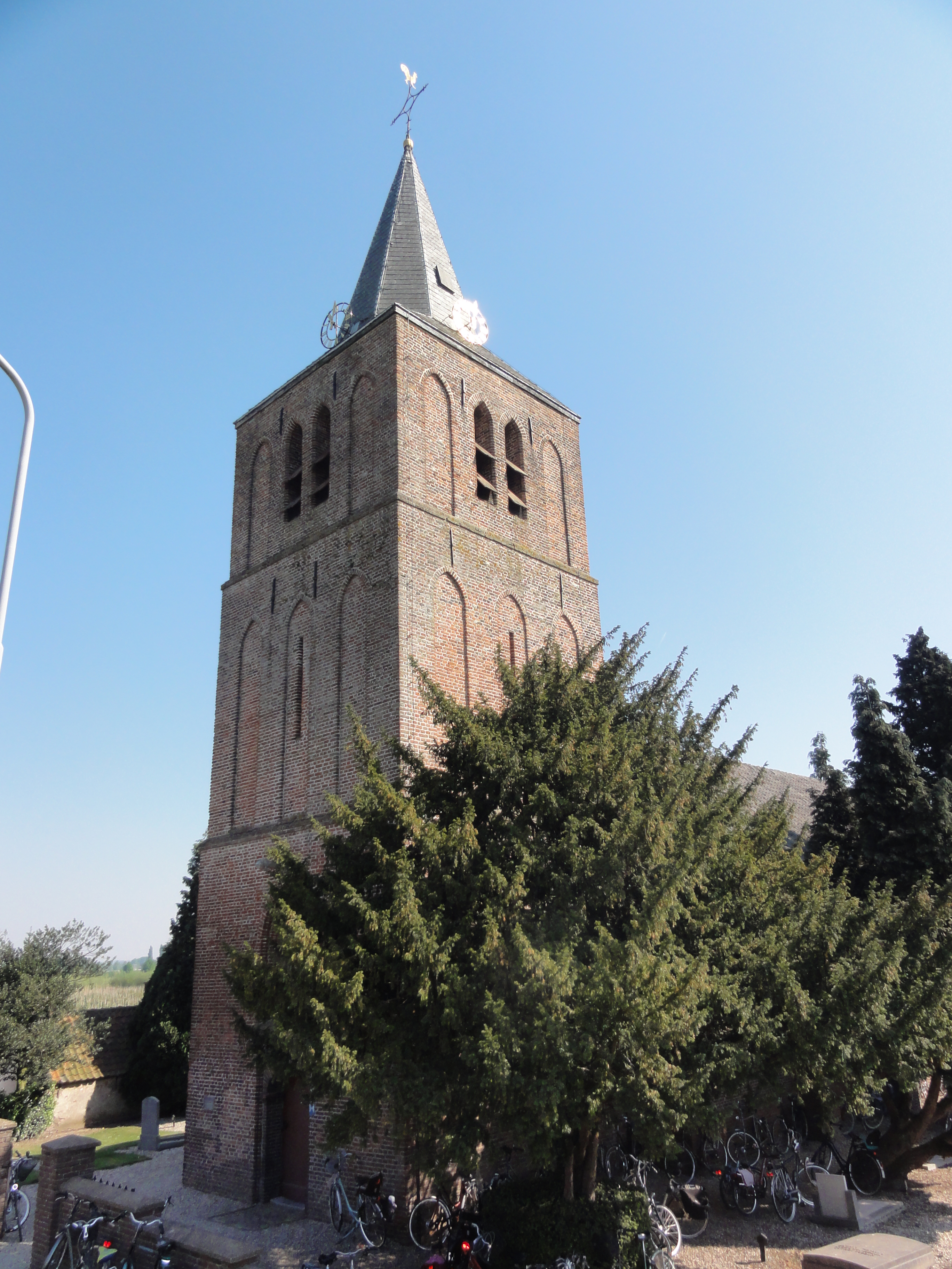 Dodewaard